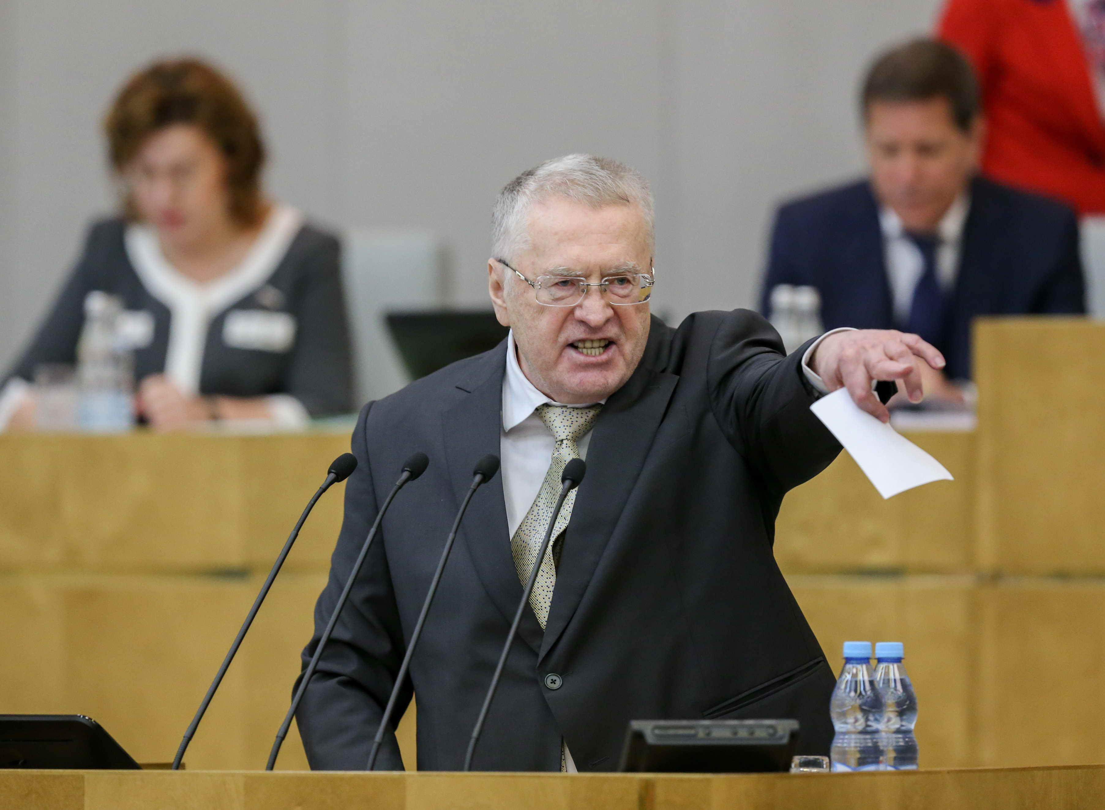 В.В. Жириновский выступает в Государственной думе